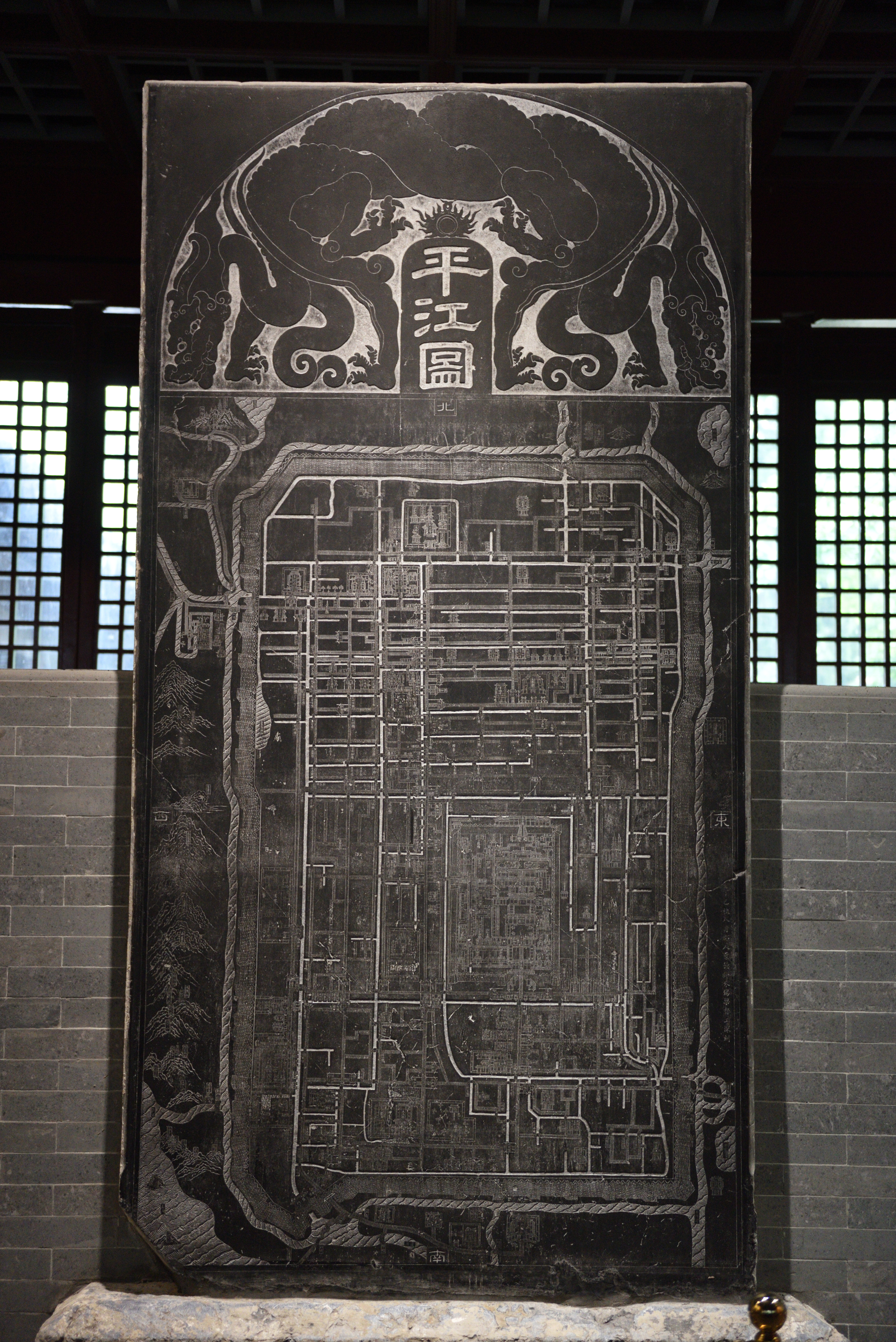 四大宋碑——平江图